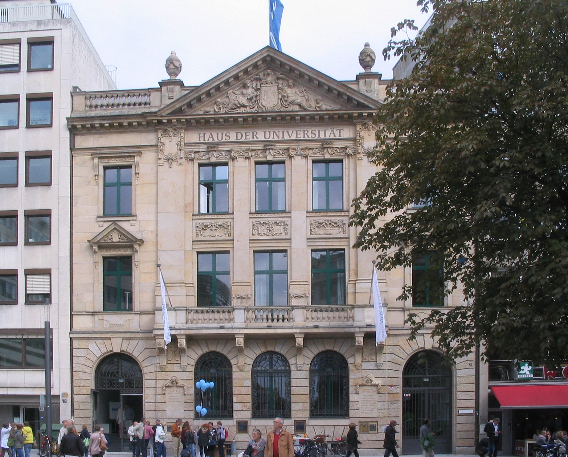 Düsseldorf, Haus der Universität, Veranstaltungszentrum der Heinrich-Heine-Universität, Schadowplatz 14. Am Tag nach der Eröffnung.